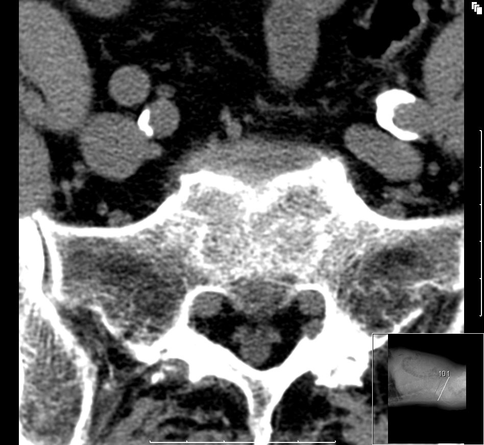 Bildbeschreibung: Erstes Kreuzbeinsegment, Wirbelkanal, Nervenwurzeln Quelle: eigene Aufnahme Datum: Autor: User:Scuba-limp